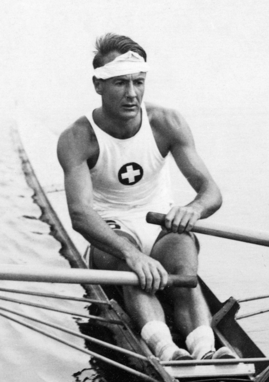 Sport, roeien. Olympische Spelen Amsterdam, Nederland, 1928: De Zwitserse skiffeur Candeveau. Hij werd in de 3e ronde uitgeschakeld door de Amerikaan Myers.